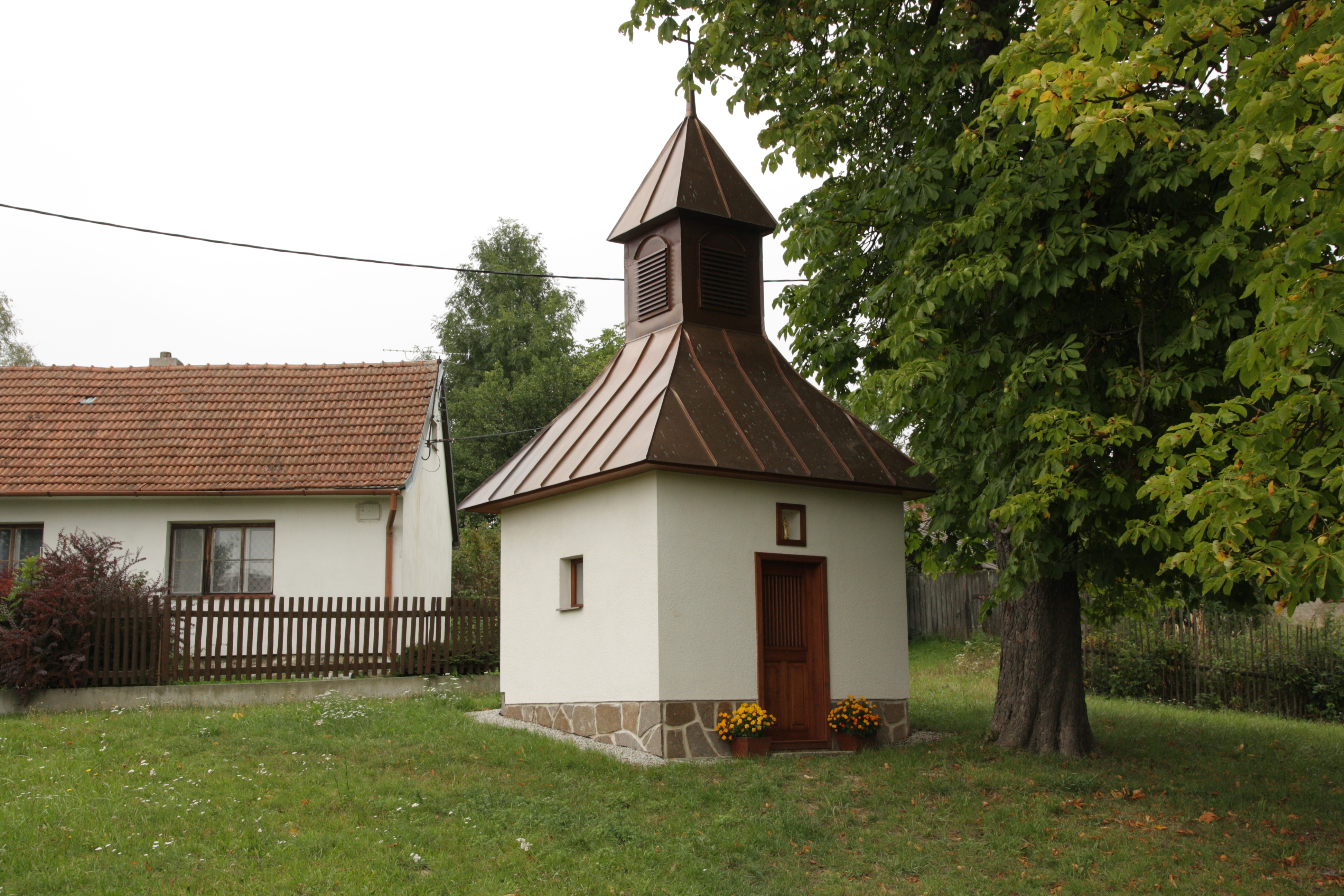 Bojanov (Křižanov) - kaple v centru vsi